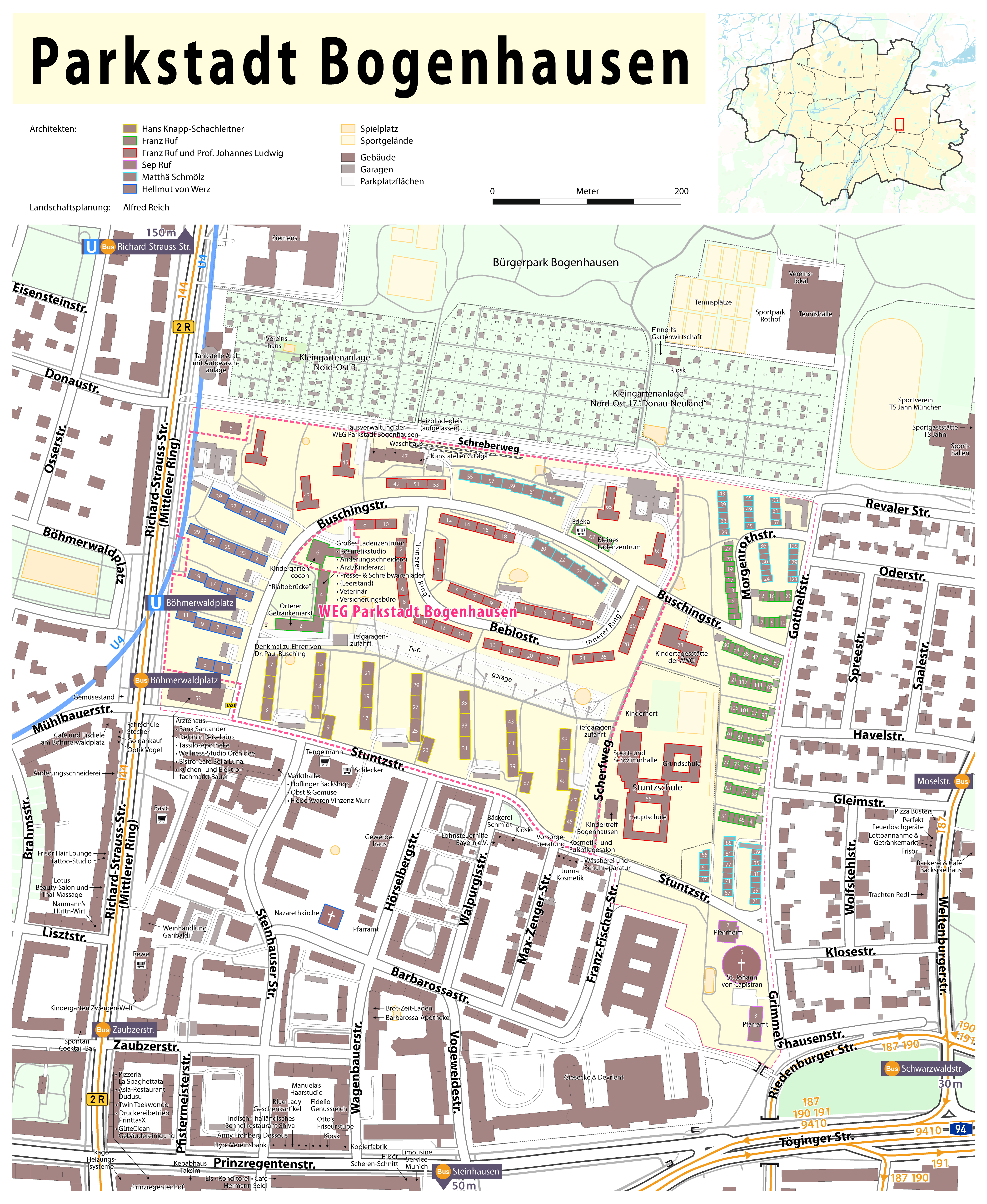 Karte der Parkstadt Bogenhausen in München